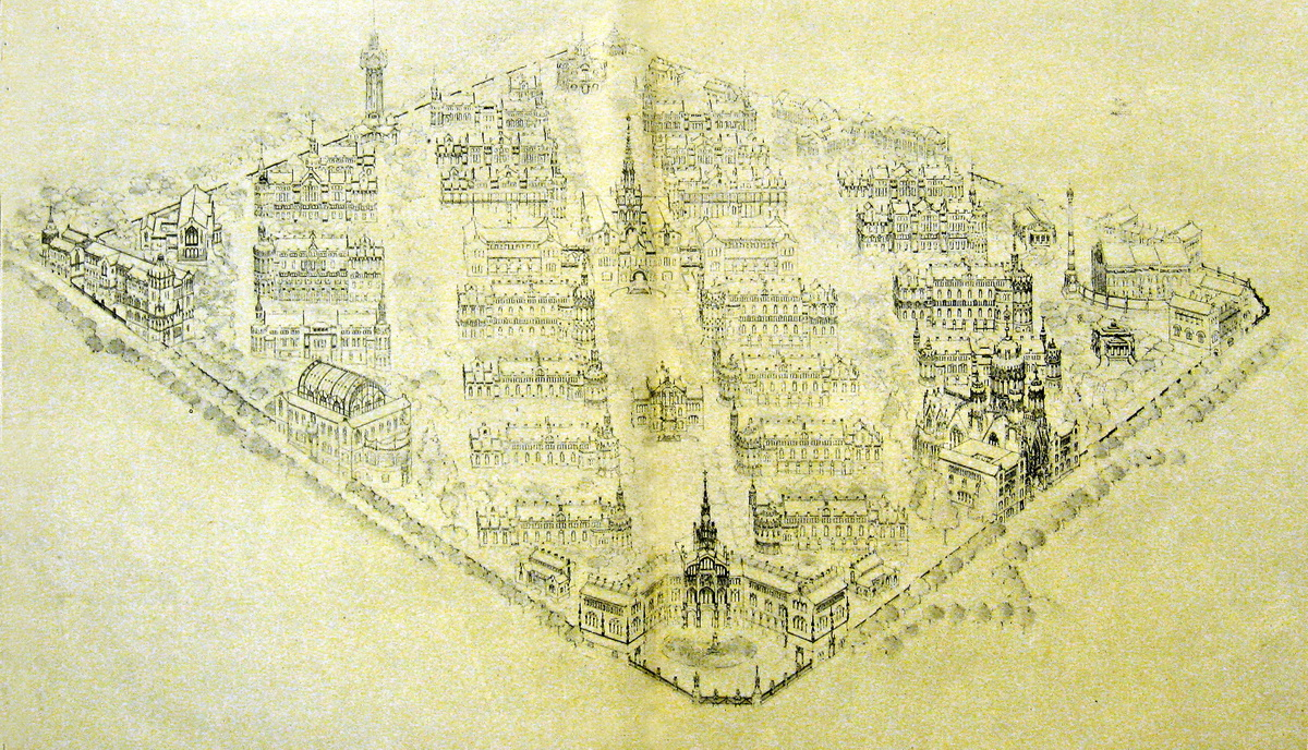 Esboç de l'Hospital de la Santa Creu i Sant Pau (1905-1930), d'estil modernista i obra de Lluís Domènech i Montaner.